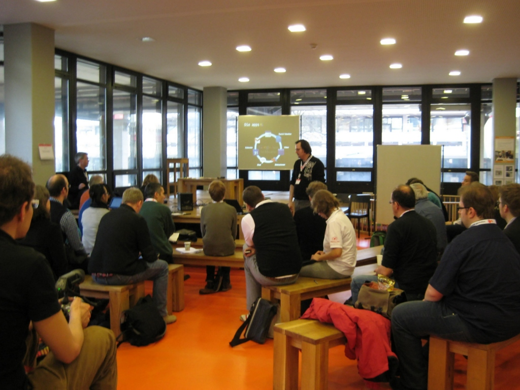 Session einer mittelgroßen Gruppe; in einer offenen Raumsituation beim EduCamp 2011 #7 an der Universität in Bremen (Deutschland). Wie beim Open Space-Format bleibt der Teilnehmer nur so lange in der Gruppe, wie er es für sinnvoll erachtet, also solange er etwas lernen und/oder beitragen kann.